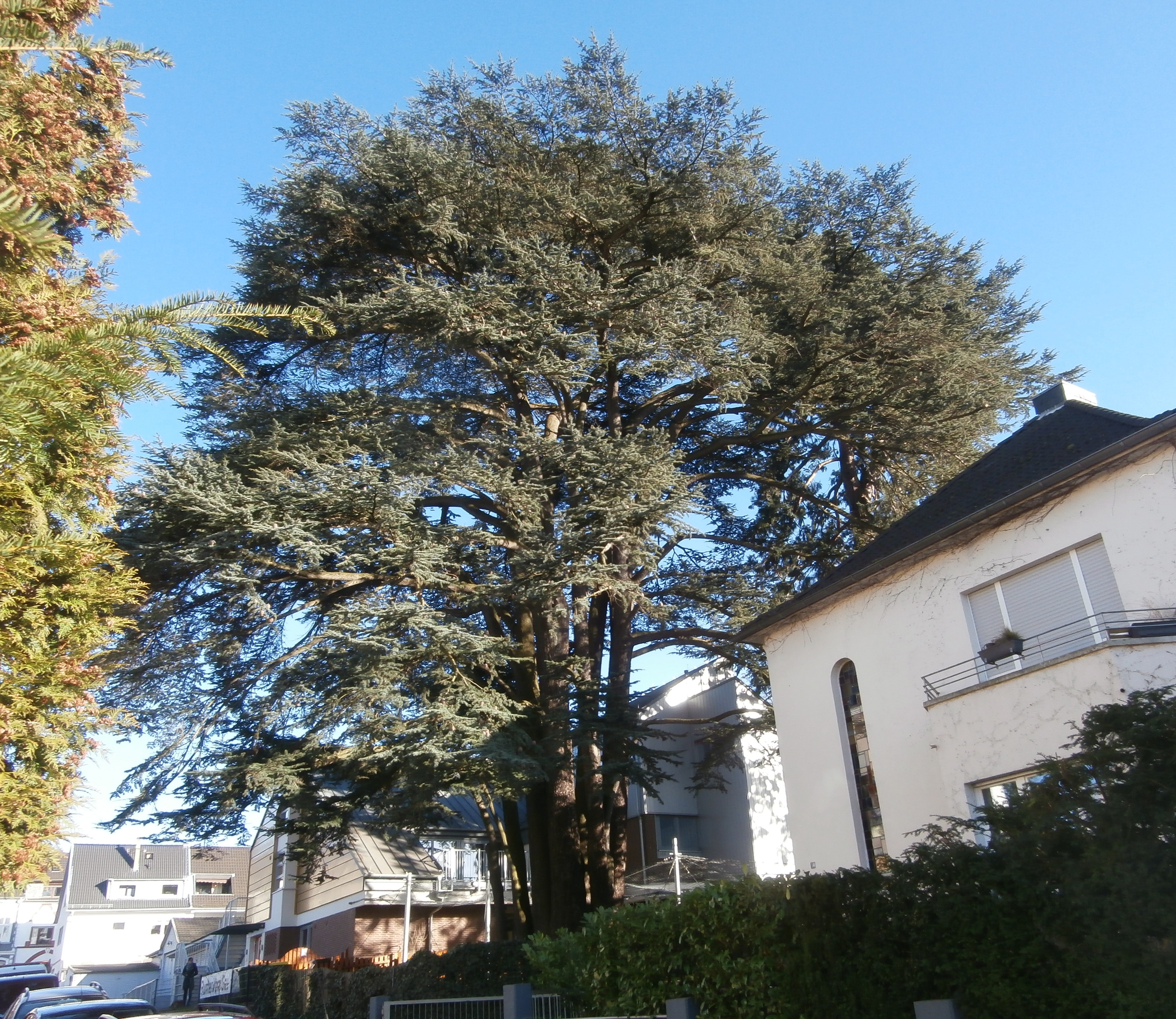 Libanonzeder (geschütztes Naturdenkmal), Bernhard-Klein-Straße, Bad Honnef